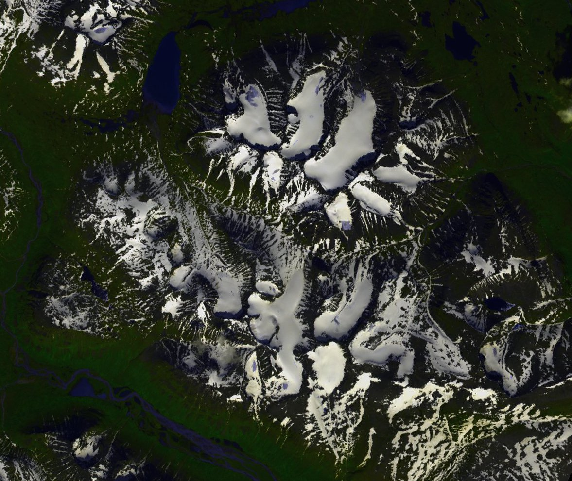 Photo satellite ASTER (NASA) du massif de l'Äpar, dans le parc national de Sarek, en Botnie du Nord (Norbotten), Suède. En haut, le lac Bierikjavrre, et au sud, les méandres (Rapasalet) de la Rapaätno. Photo prise le 2 septembre 2008.